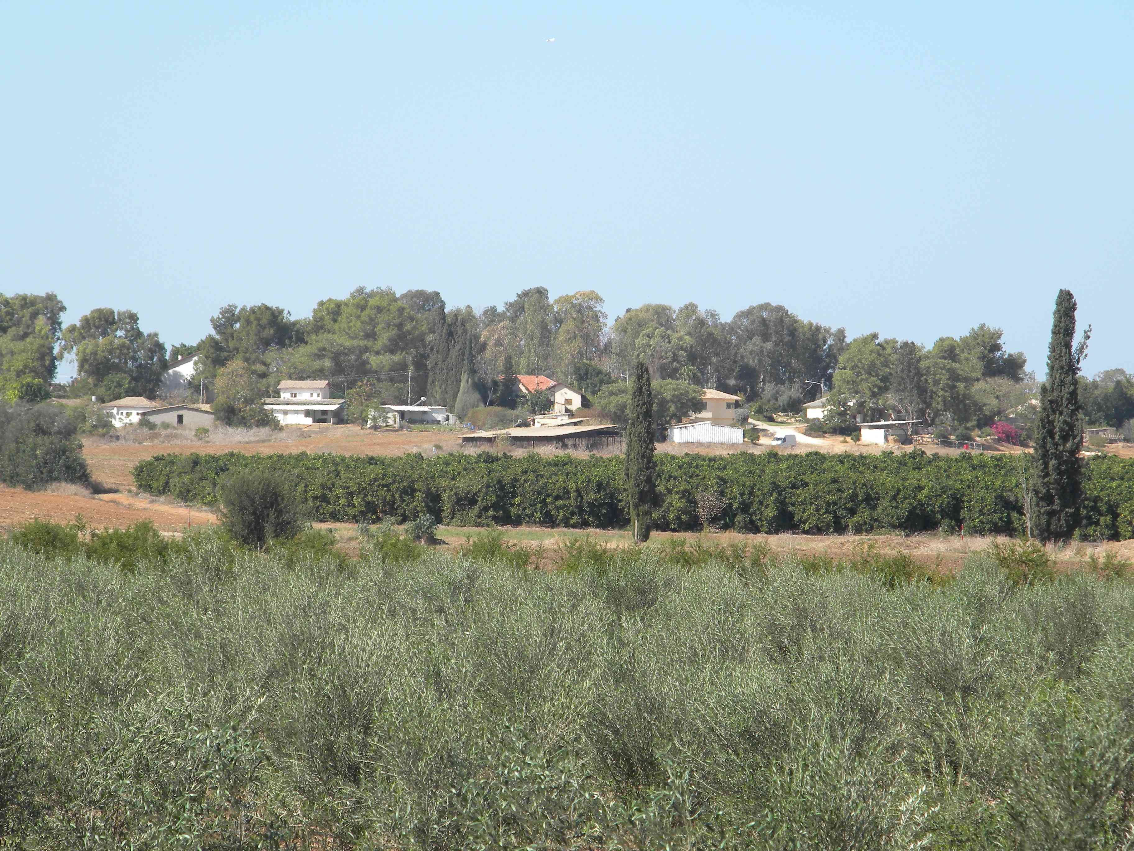 מראה אופייני בכפר מרדכי